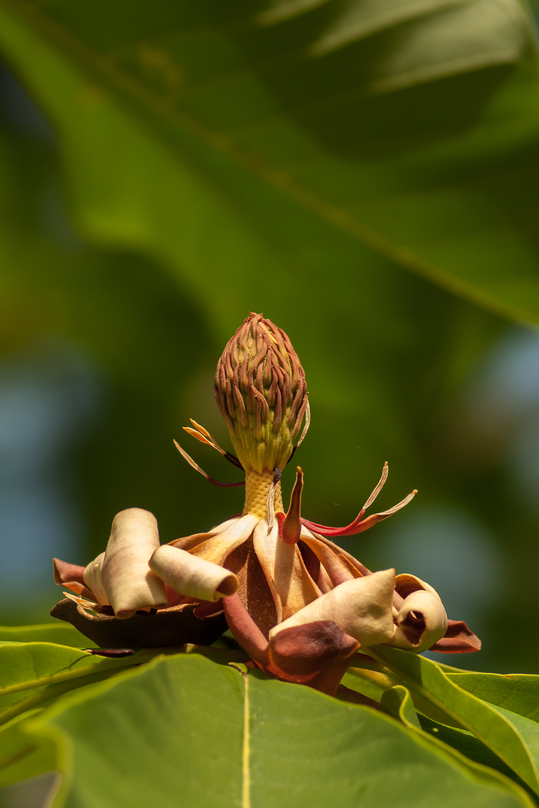 Magnolia obovata, Frucht mit Blütenblättern.